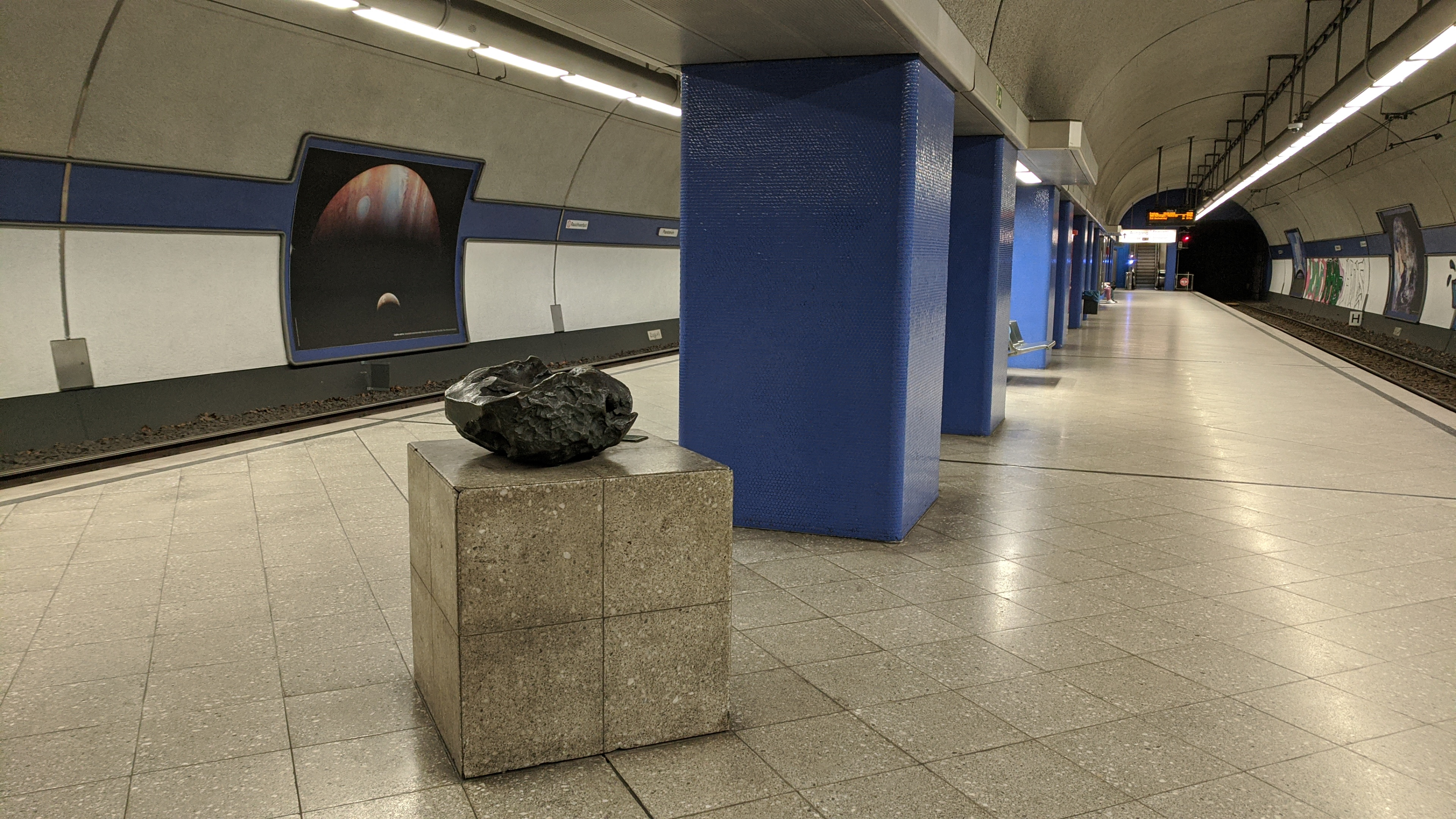 Stadtbahn Bochum, U-Bahnhof Planetarium, Bahnsteig der Linien 308, 318, Auf dem Bahnsteig ist ein Abguss eines in Fort Amalia Gibeon/Namibia gefundenen Meteoriten ausgestellt. Das Original liegt im Deutschen Bergbau-Museum Bochum. Taken on 29 May 2020